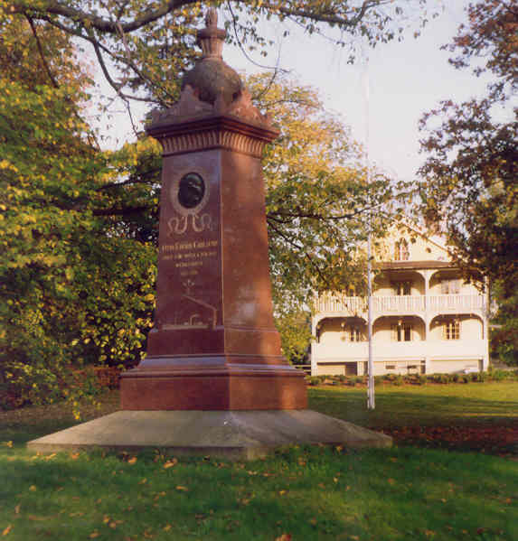 Motala verkstad, en bild tagen av Harri Blomberg i september 1992.